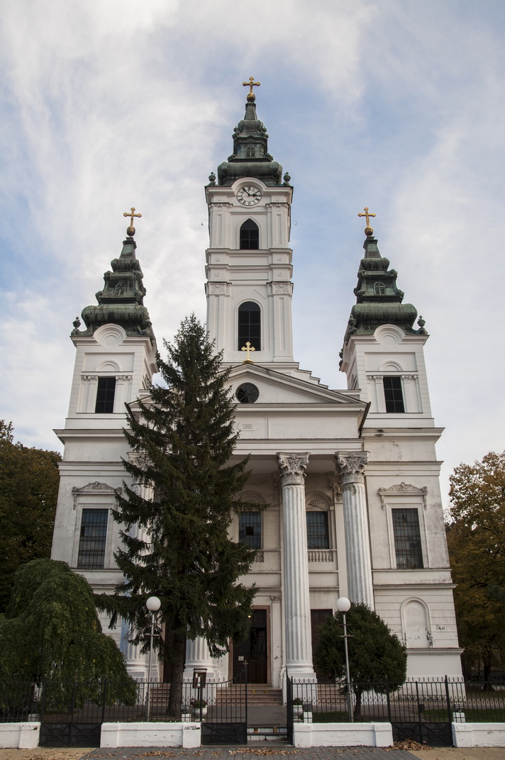 A belvárosi ortodox templom 2017-ben.